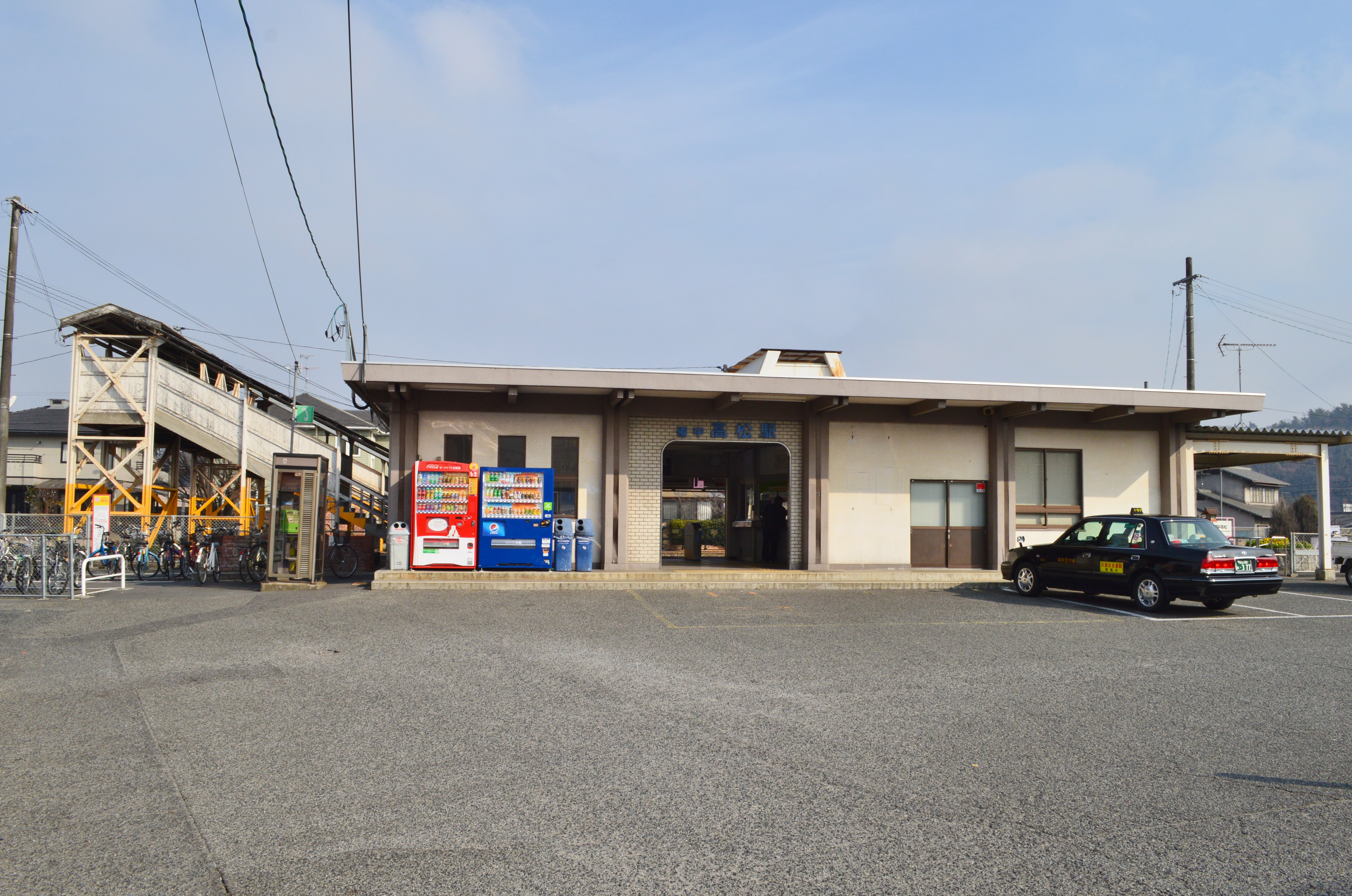 備中高松駅 駅舎